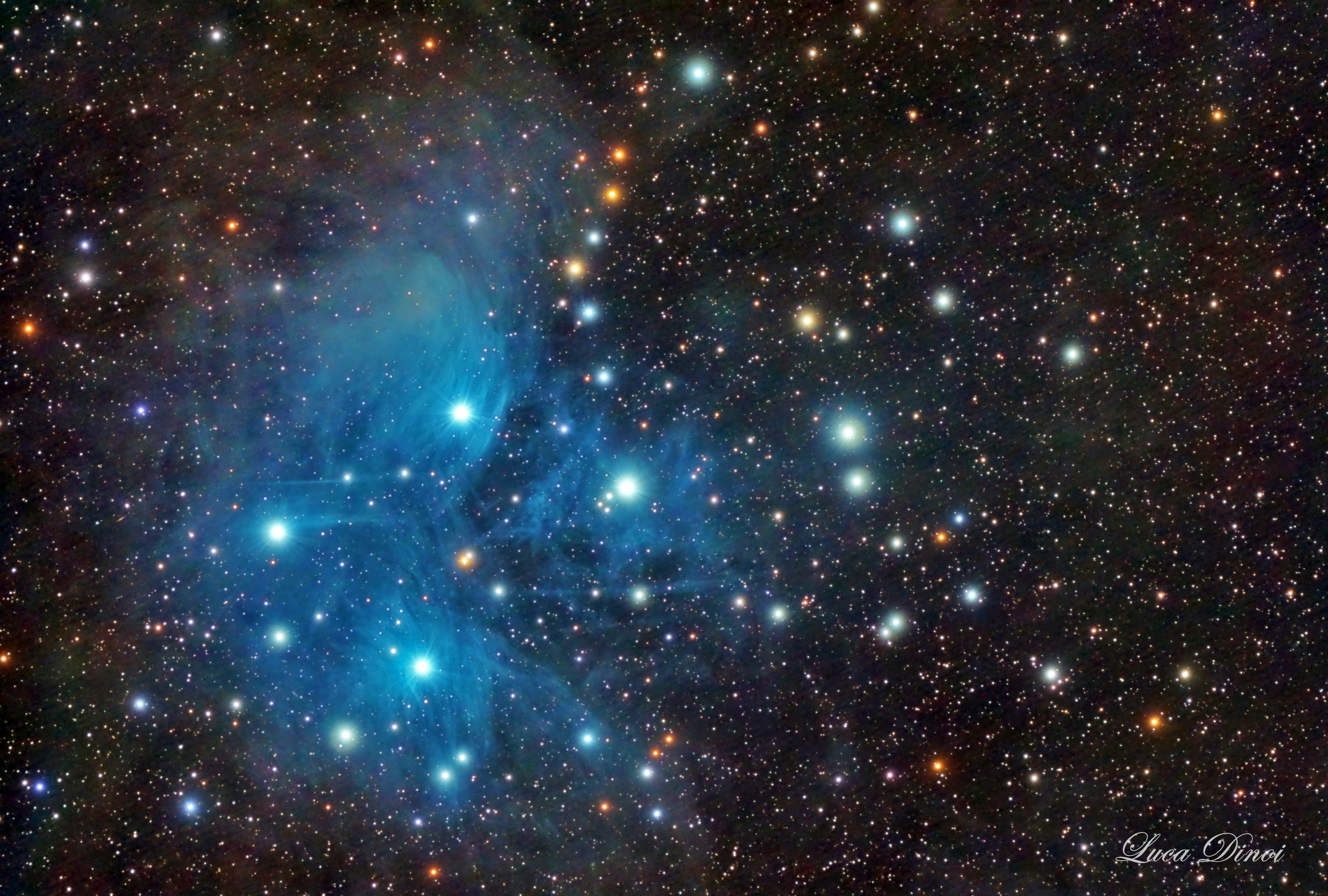 Ammasso aperto delle Pleiadi Strumentazione: Tripletto Apocromatico su montatura equatoriale e camera astronomica.